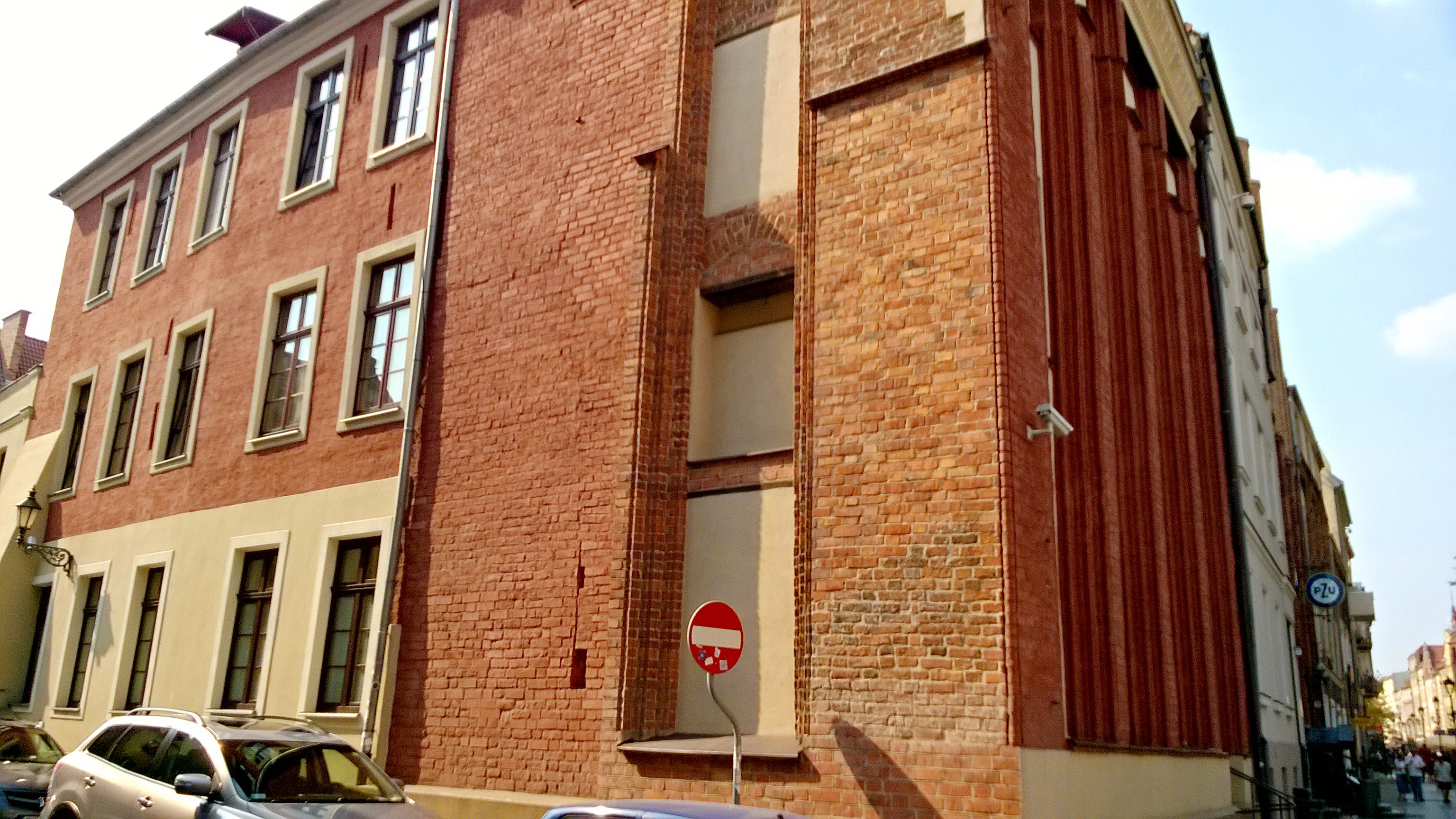 Dom Prowincjalny Zgromadzenia Sióstr św. Elżbiety w Toruniu